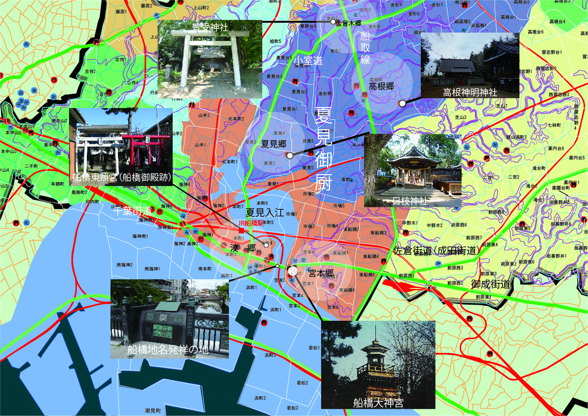 船橋市史や